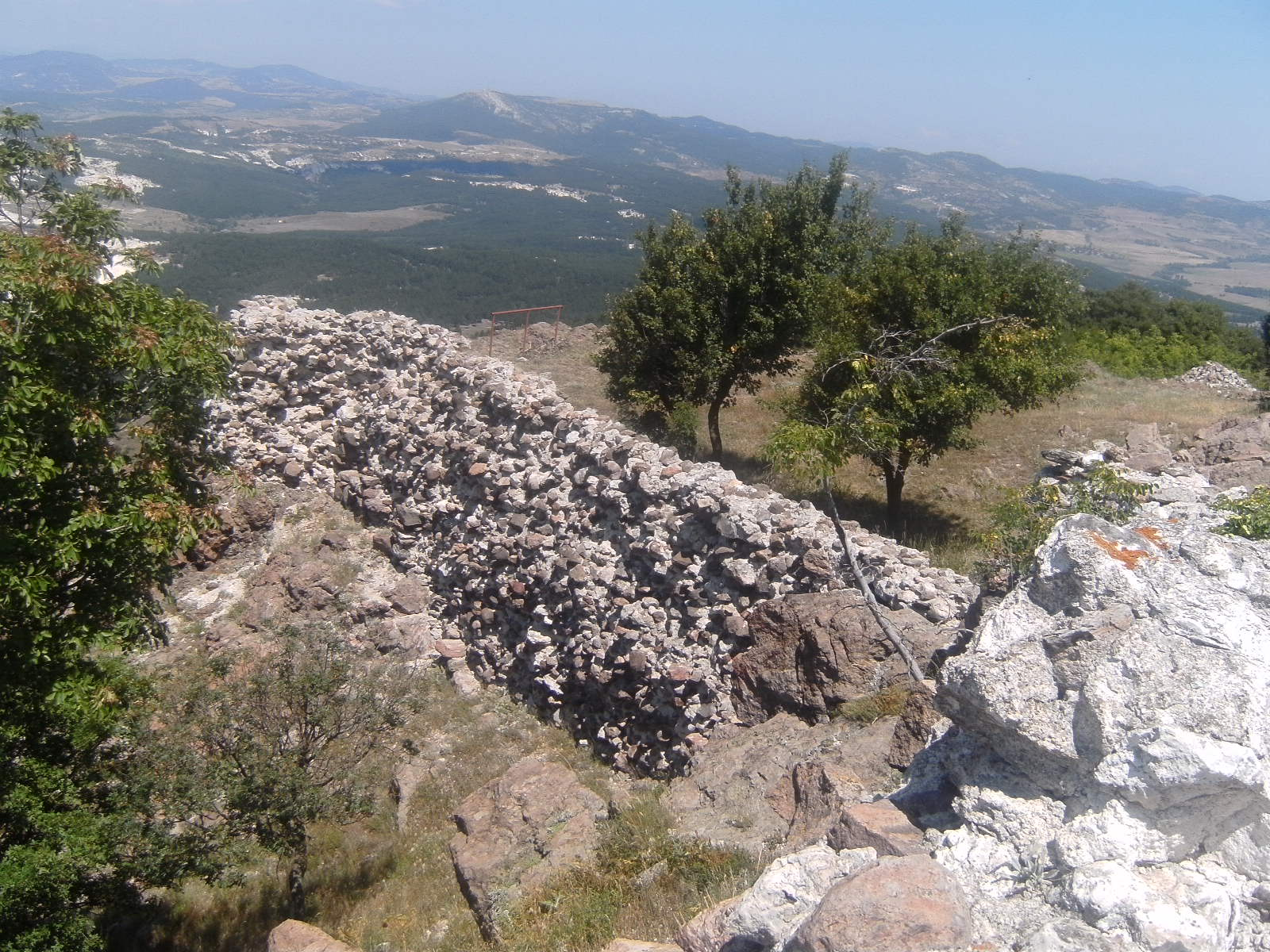 Монек